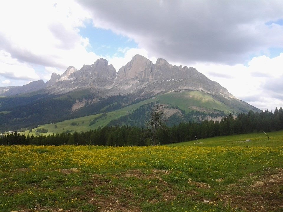 Parco naturale dello Sciliar-Catinaccio (Q520612)